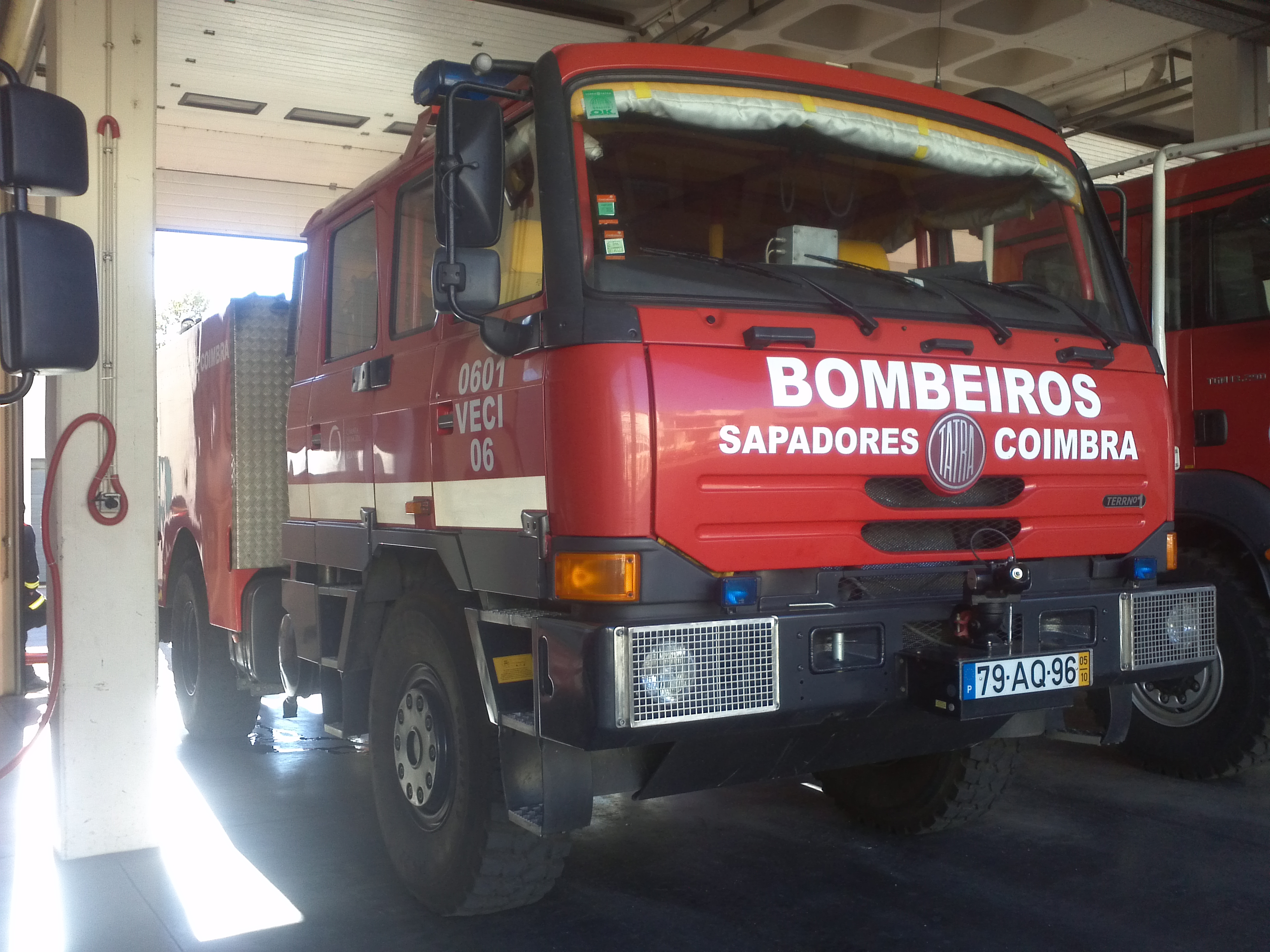 Veiculo Especial de Combate a Incêndios 06